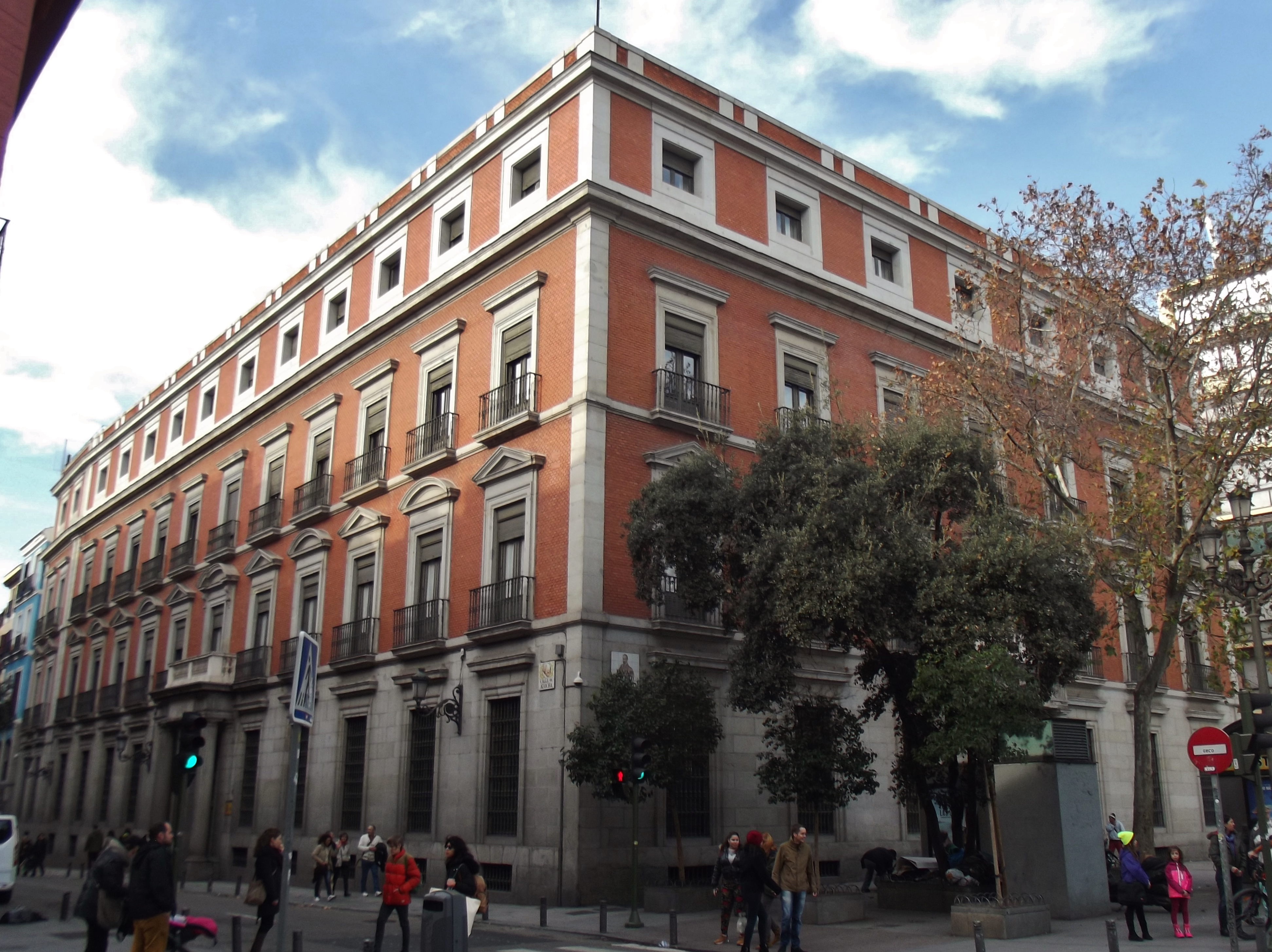 Antigua casa de los Cinco Gremios.